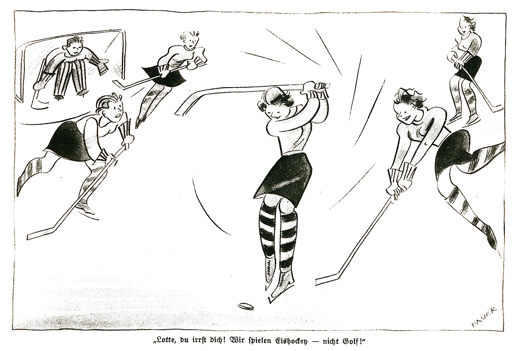 "Lotte du irrst dich, wir spielen Eishockey, nicht Golf!" (Karikatur, 1941)